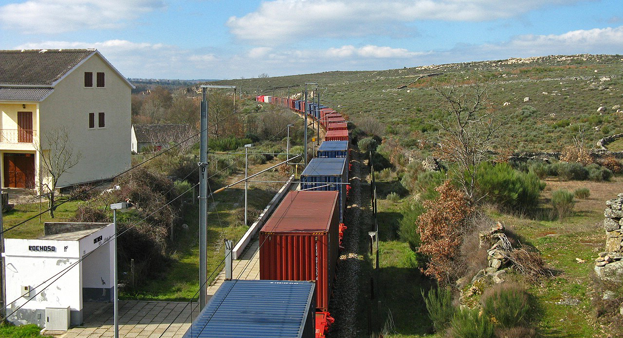 Passagem ao apeadeiro do Rochoso (Beira Alta) com a 6007 à cabeça